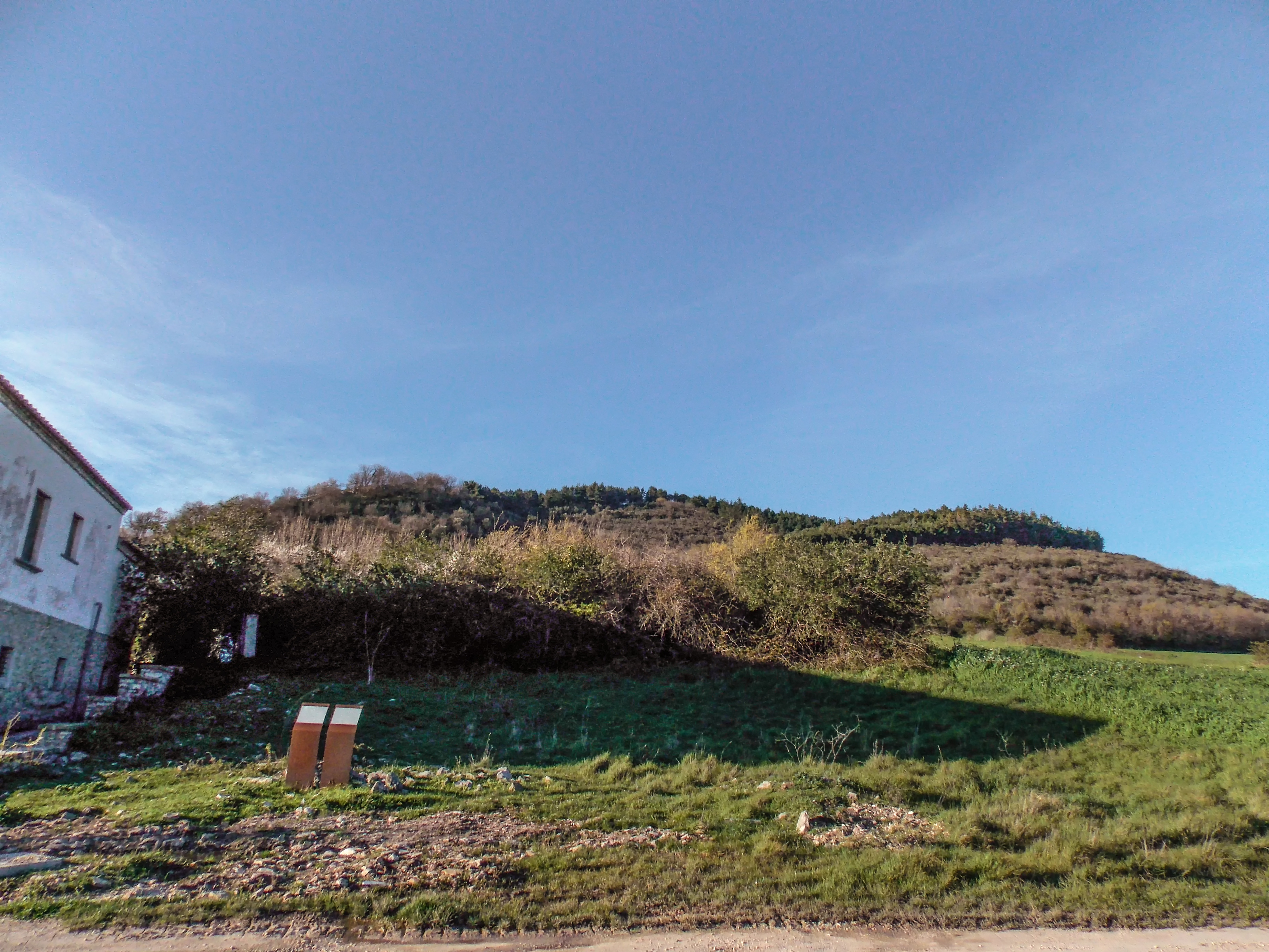 L'area archeologica di Monte Chiodo a Buonalbergo, in provincia di Benevento